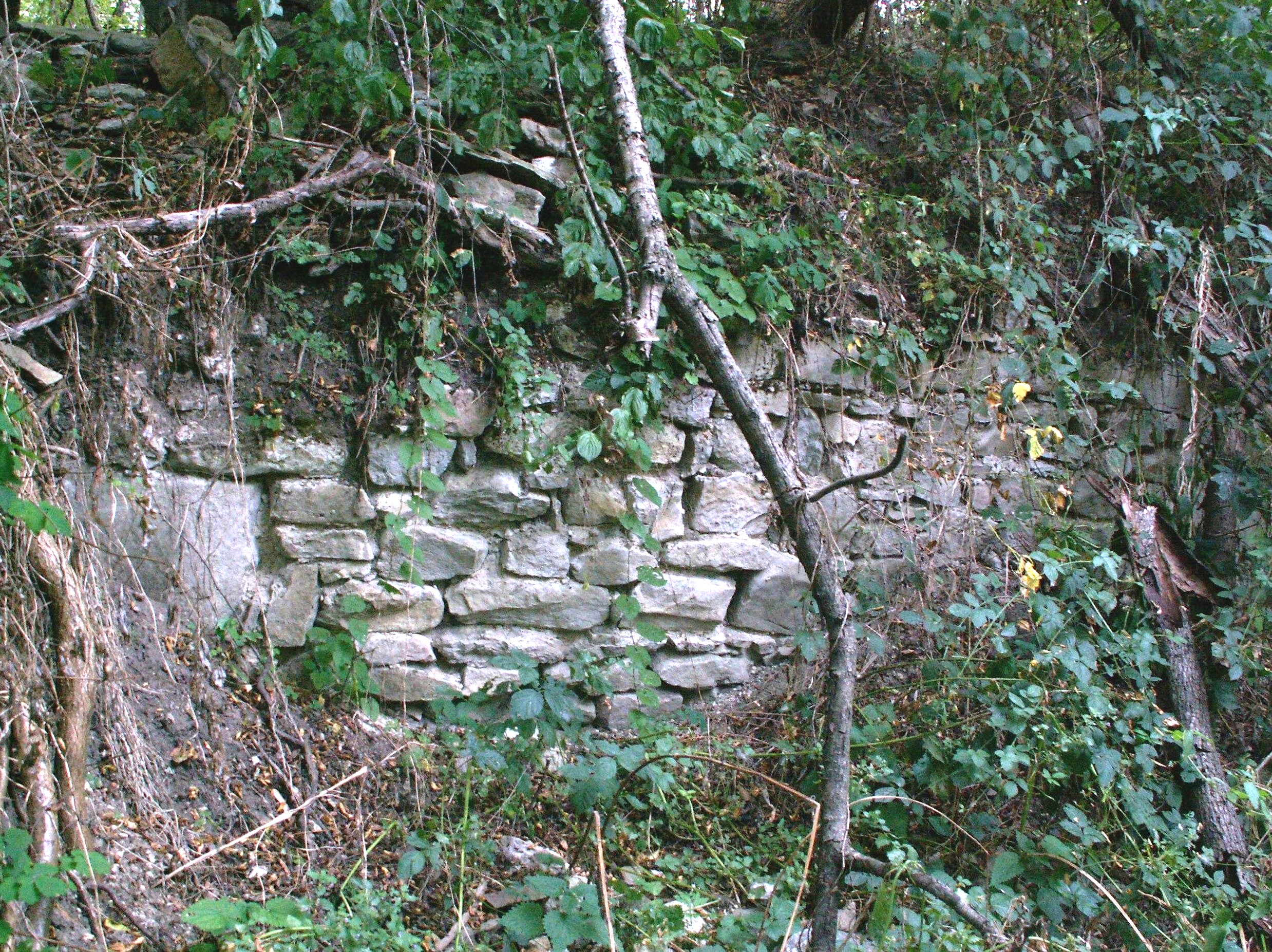 Част от запазените зидове на крепостната стена. Фото: Вл. Стойков.